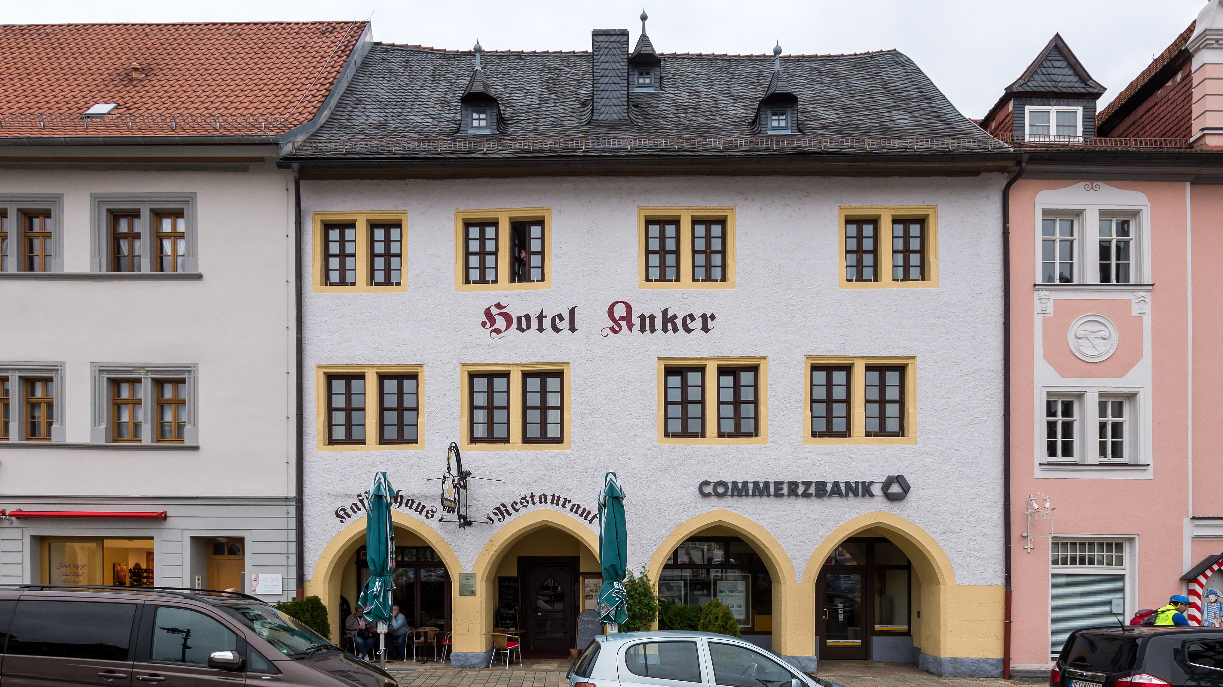 Saalfeld Markt 25 Gasthaus (Hotel Anker) I